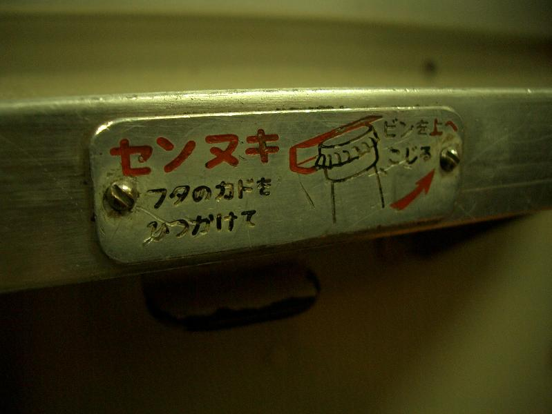 JR北陸線の電車の窓の下の机の下に「センヌキ」が